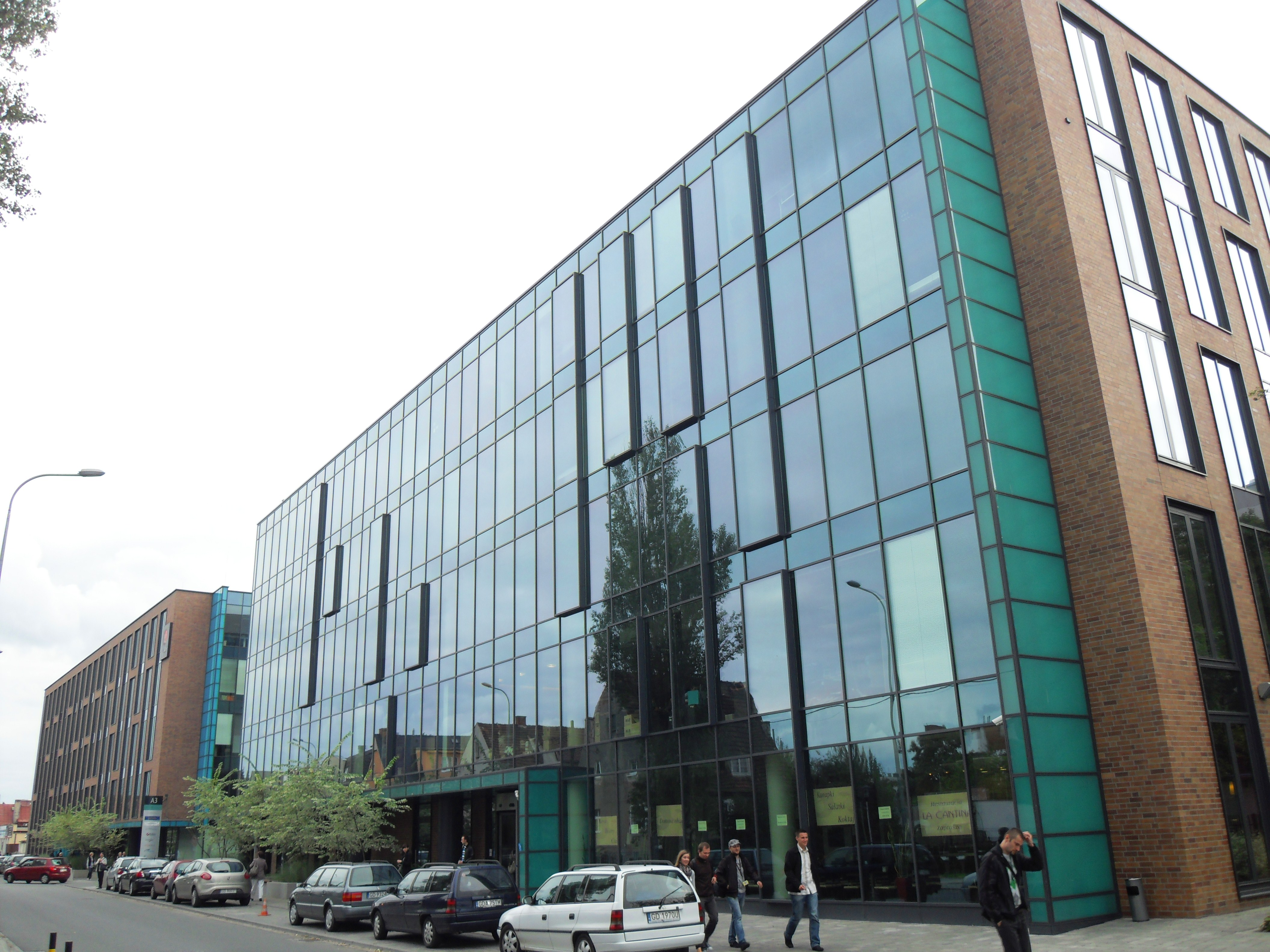 Gdańsk Przymorze. "Arkońska Business Park", budynki A1 (na pierwszym planie) i A3.